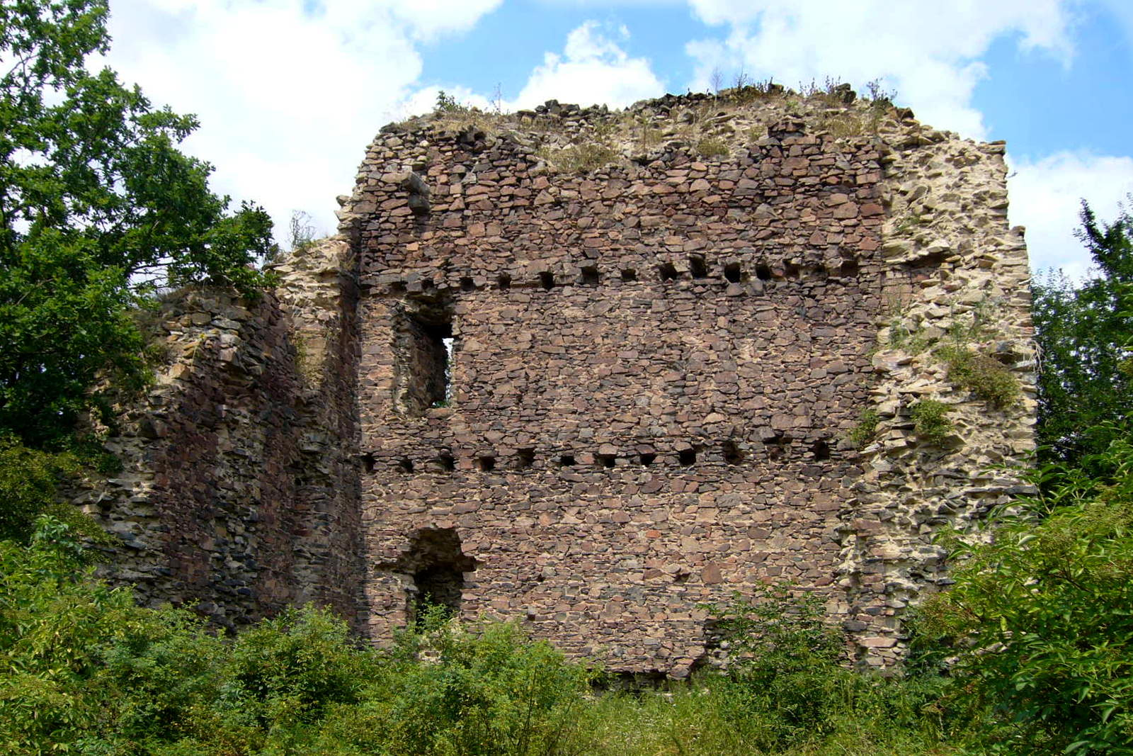 Interiér donjonu, Hrochův hrádek, východně od vsi, Dobrá Voda (Březnice).